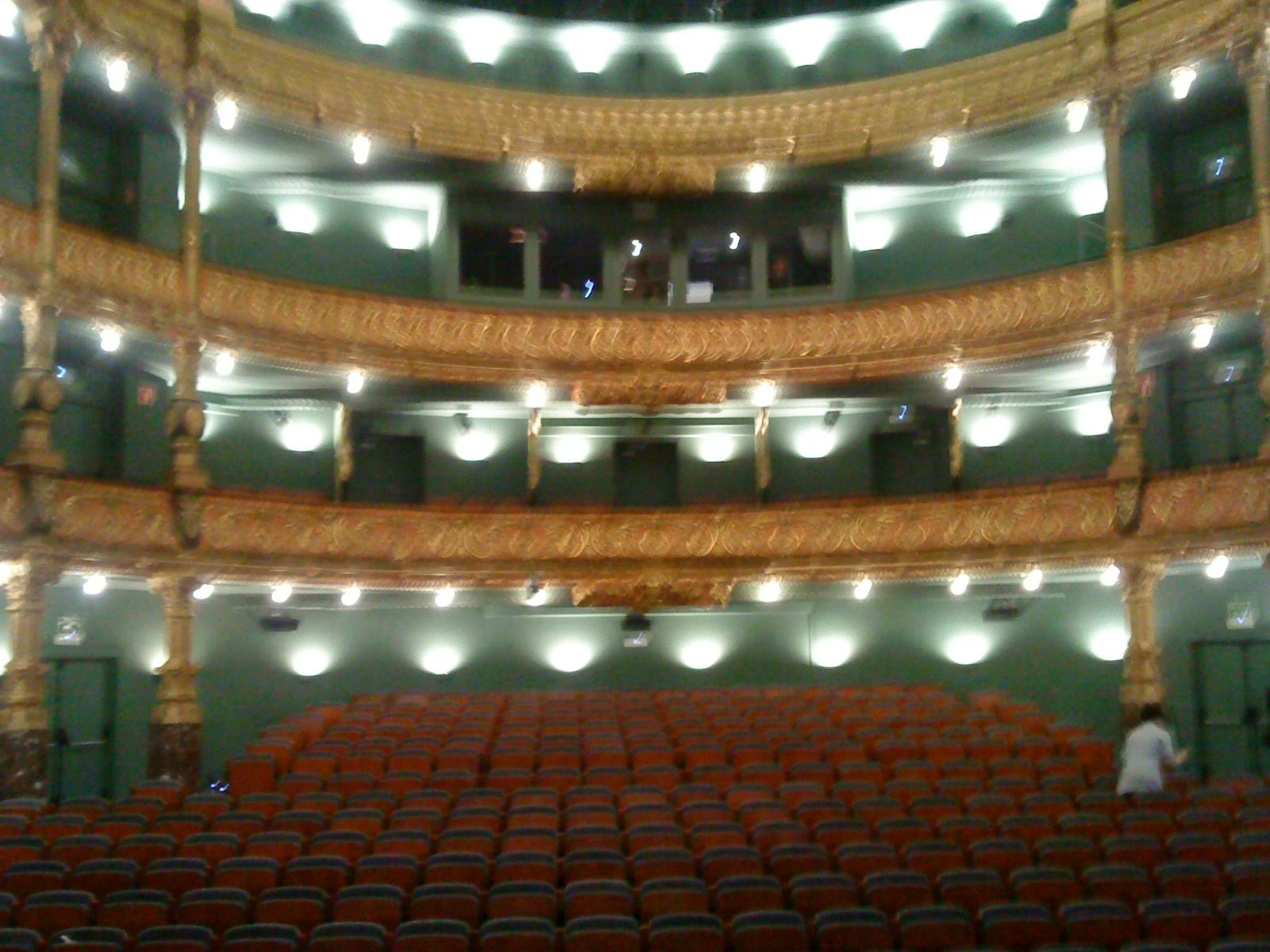 Vista del patio de butacas desde el escenario del teatro Arteria Campos Elíseos Antzokia de Bilbao, Vizcaya (País Vasco, España)